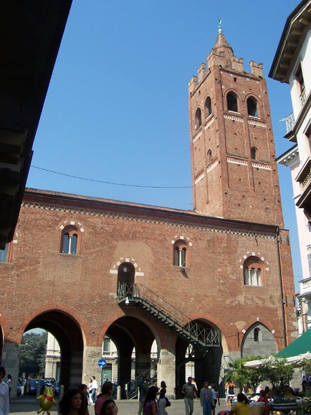 Monza - Arengario